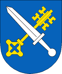 Wappen der politischen Gemeinde Allschwil, Schweiz